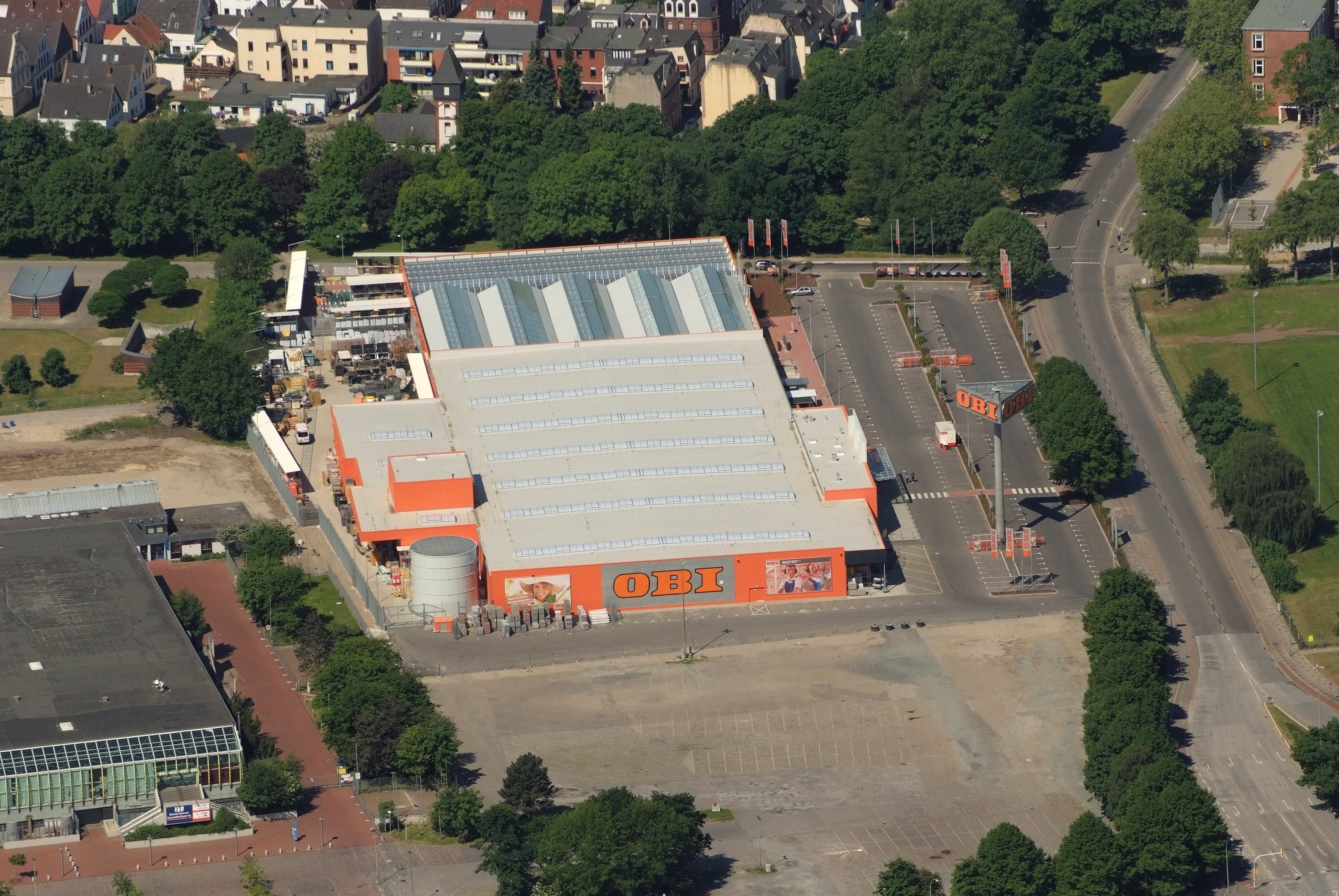 Fotoflug vom Flugplatz Nordholz-Spieka über Cuxhaven und Wilhelmshaven